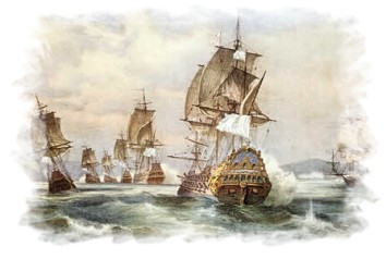 Escadre de Duguay-Trouin, XVIIIe siècle